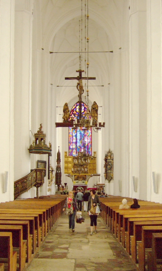 Nawa główna Bazyliki Mariackiej w Gdańsku.